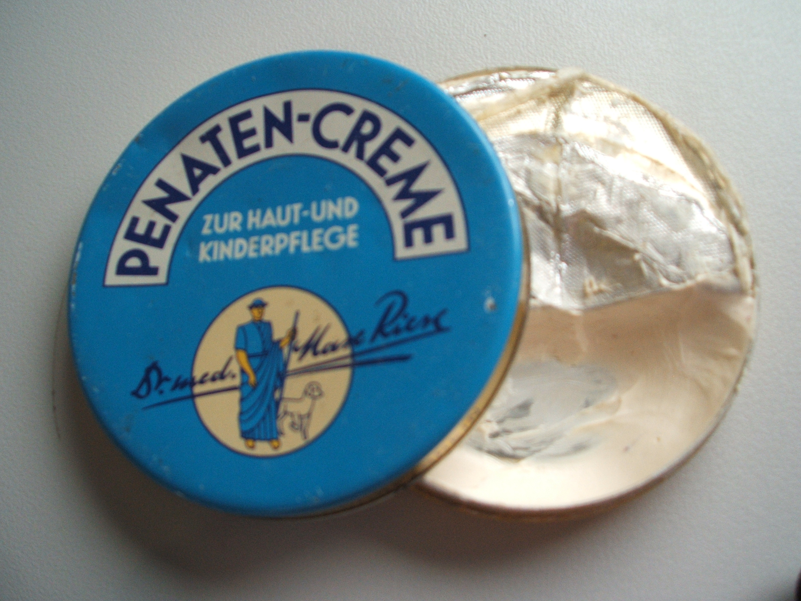 Penaten-Creme-Tin 80er Jahre